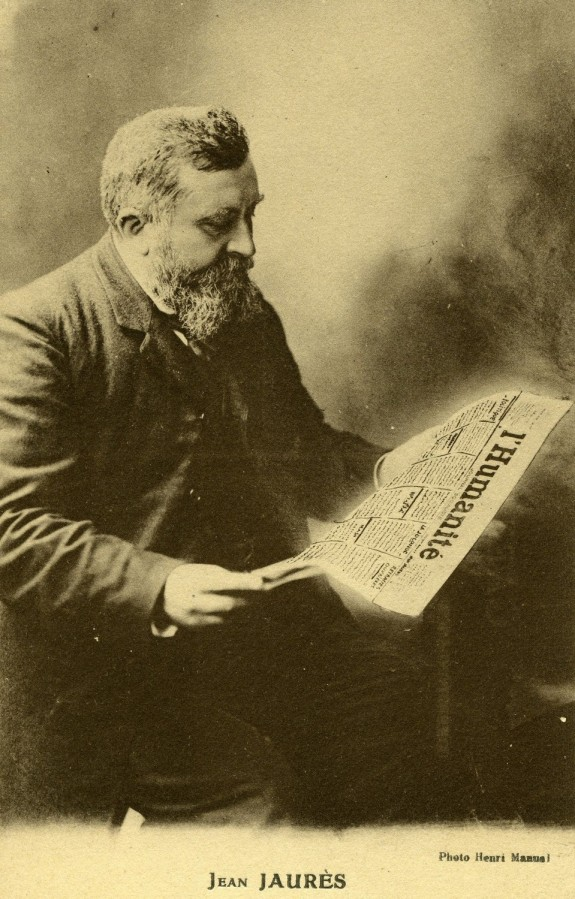 Jean Jaurès lisant L'Humanité, photographie de Henri Manuel.